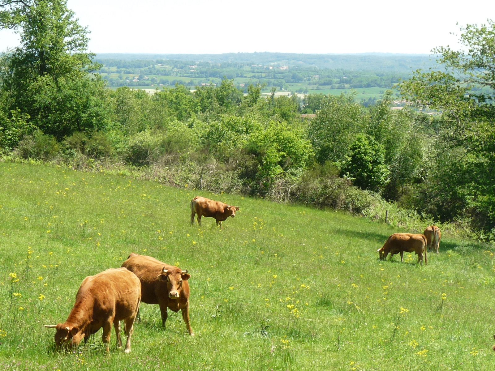 vaches limousines et vue vers le sud-est depuis la crête du massif de l'Arbre, commune d'Orgedeuil, Charente, France